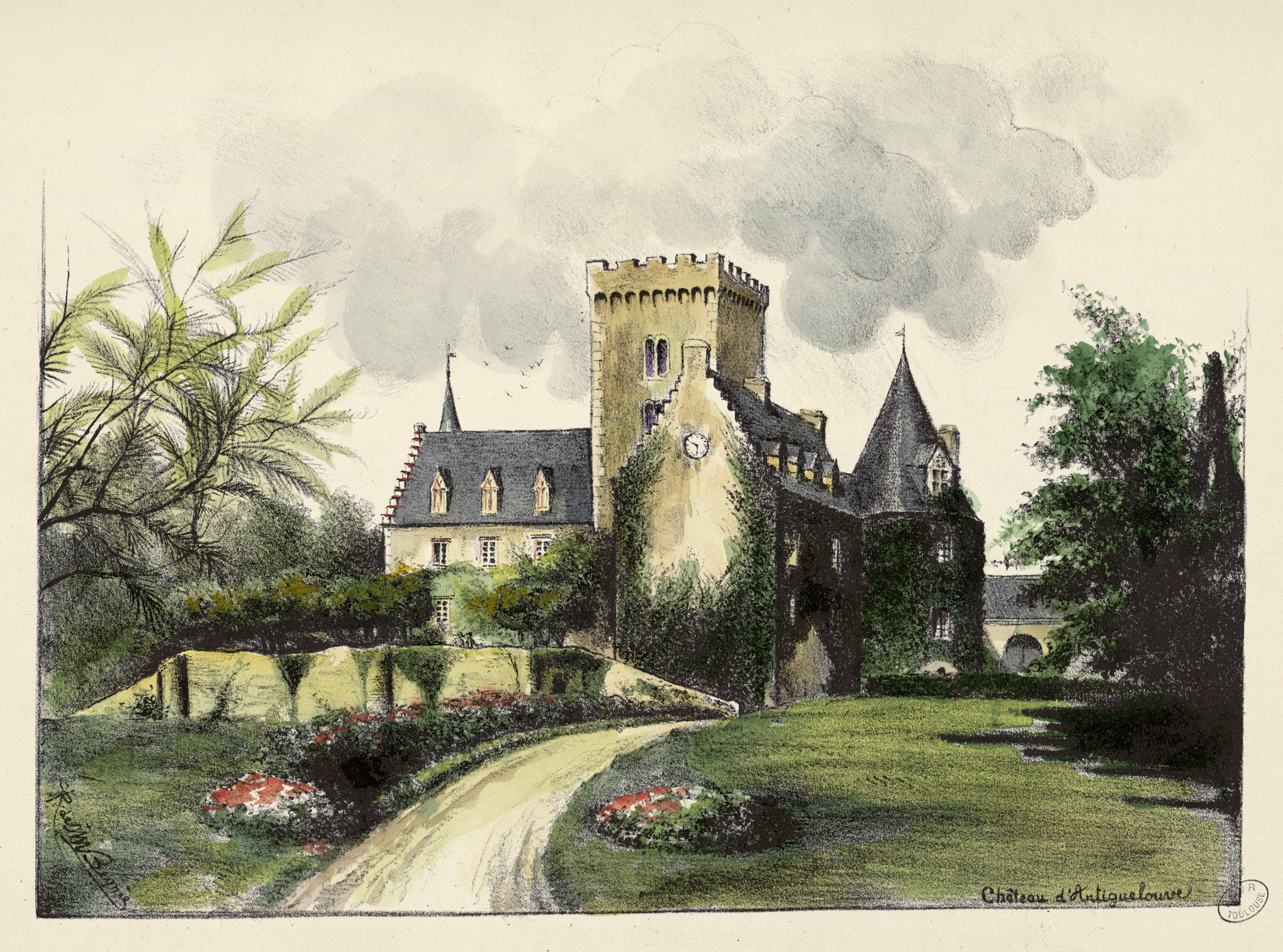 Ancely, René (1876 - 1966). Possesseur